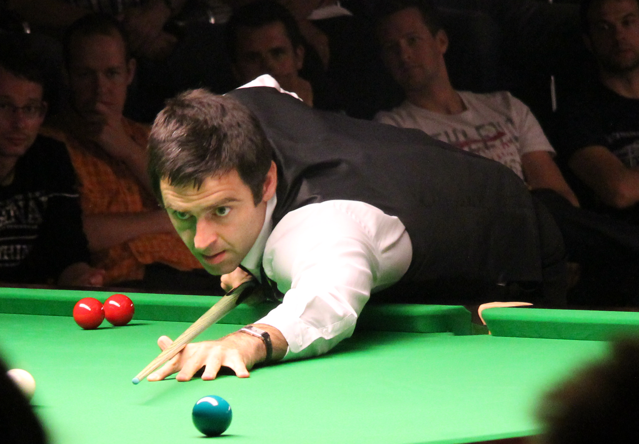 Ronnie O'Sullivan beim Paul Hunter Classic 2011